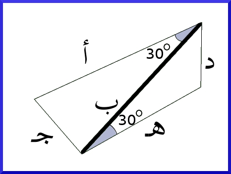 توضيح لعملية دوران الضلع أ مع توضيح المركبات الوهمية